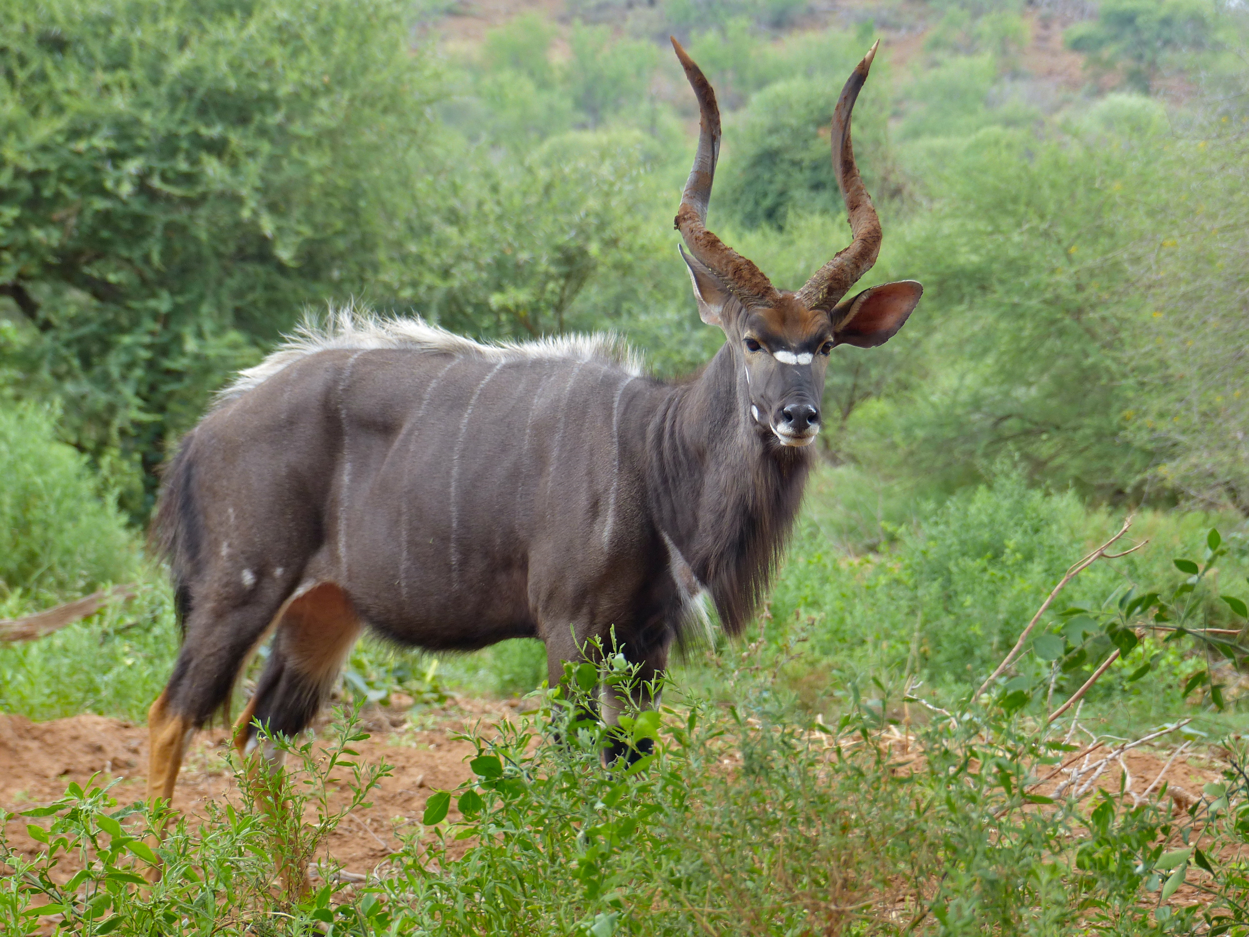 Pafuri picnic area, Kruger NP, SOUTH AFRICA